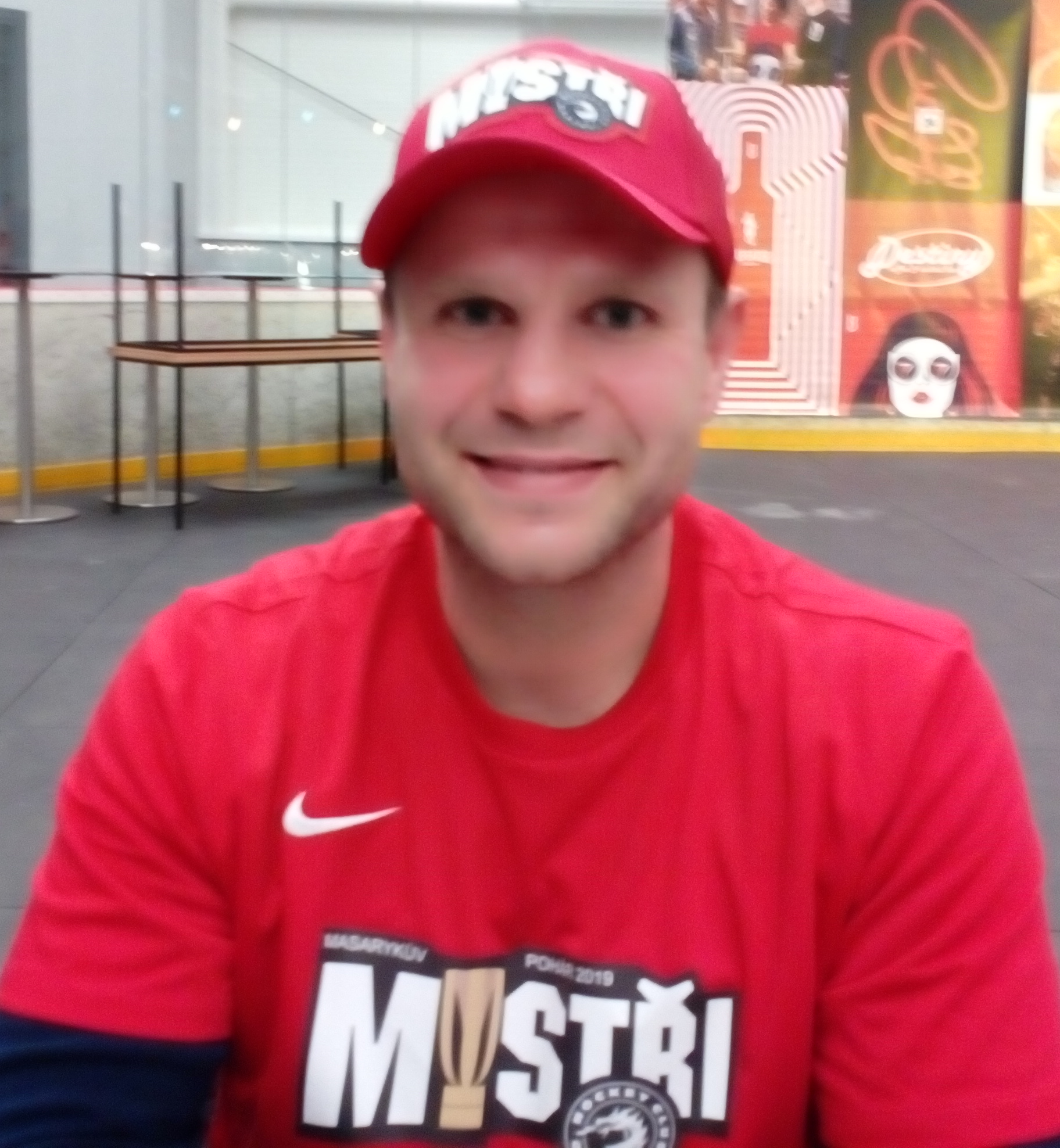 Po zakončení sezóny 2018/19 v malé Werk Areně